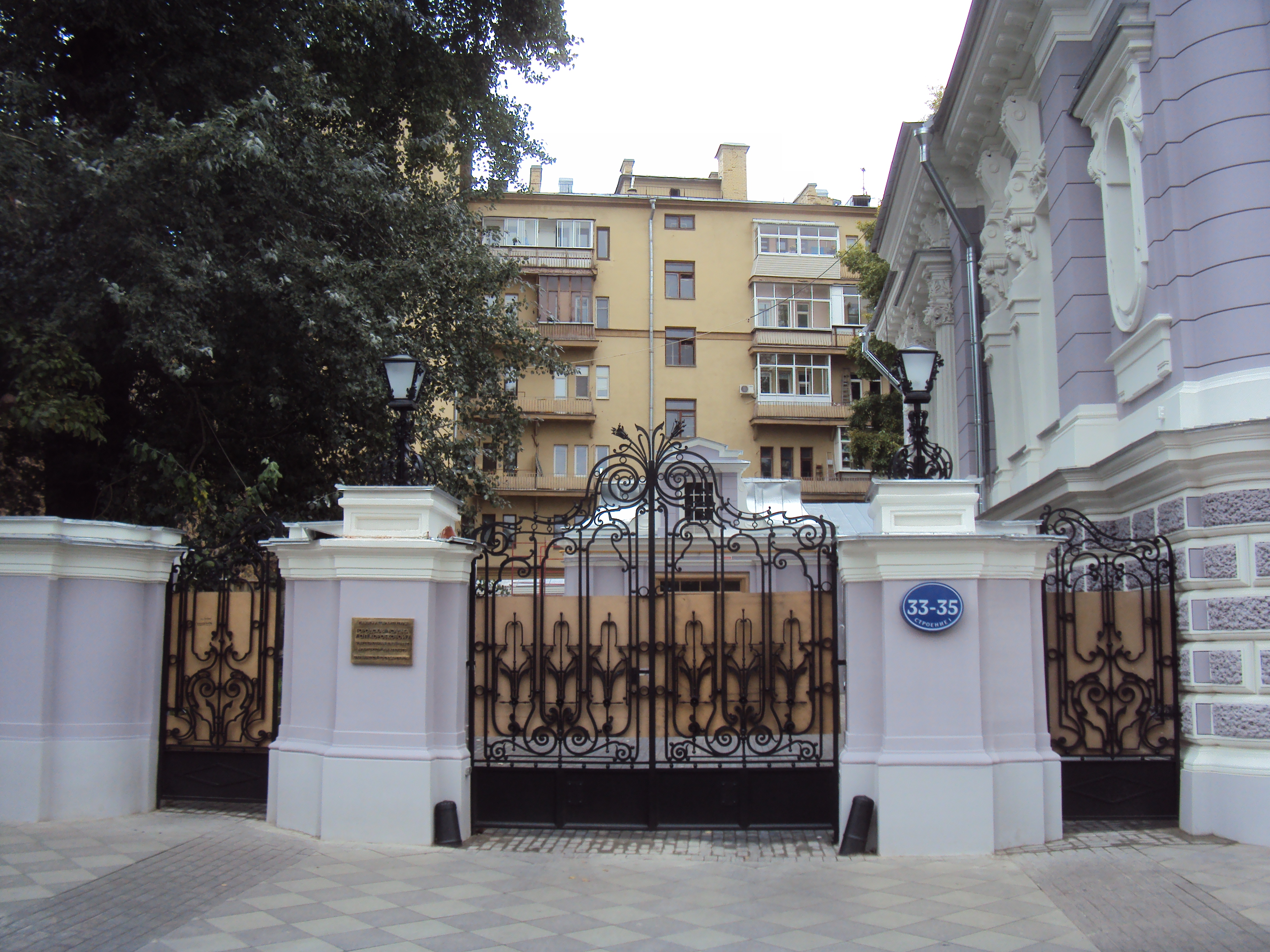 Ограда: Пятницкая ул., дом 33-35, строение 1, Замоскворечье, Центральный округ, Москва